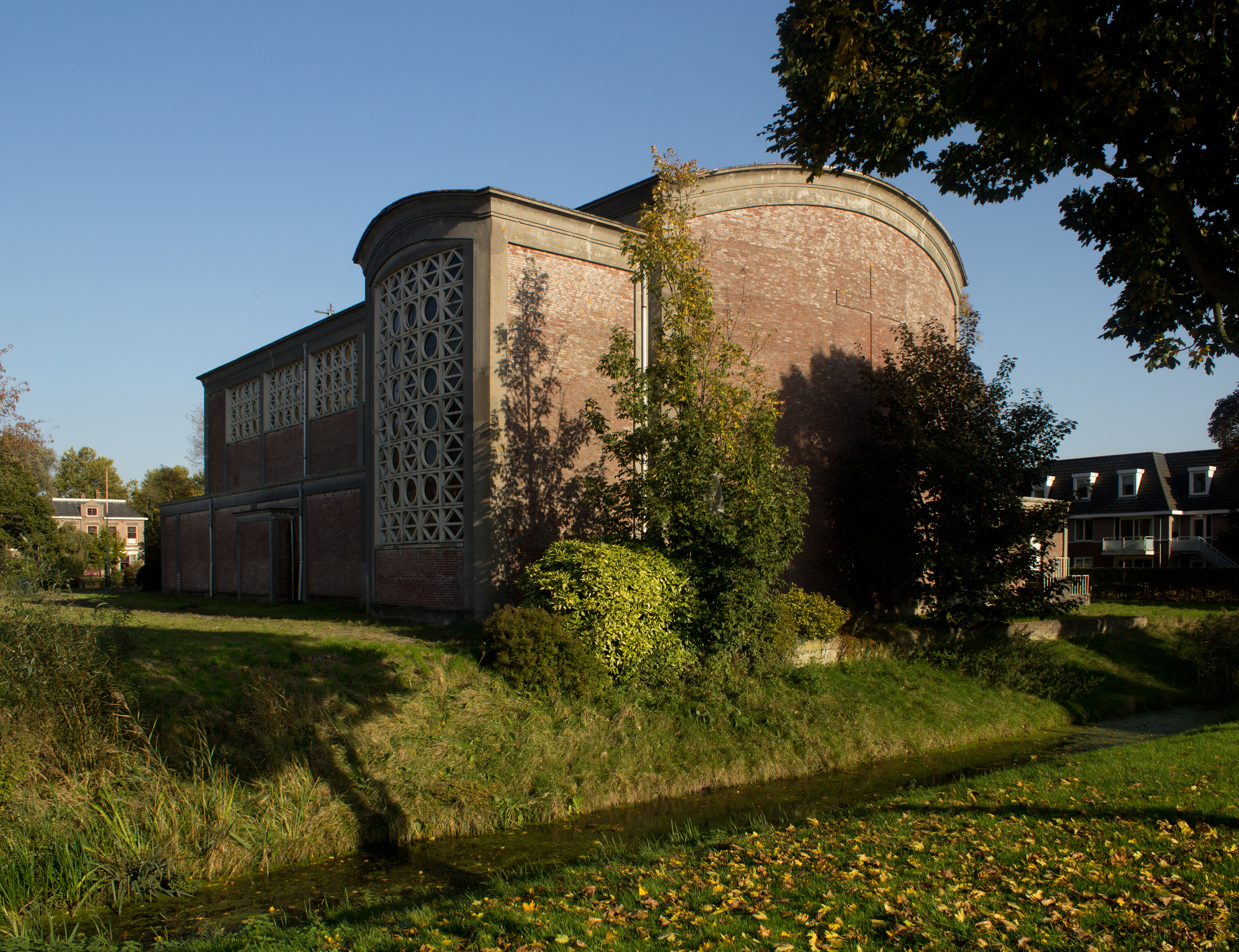 De Sint-Stephanuskerk te Moerdijk